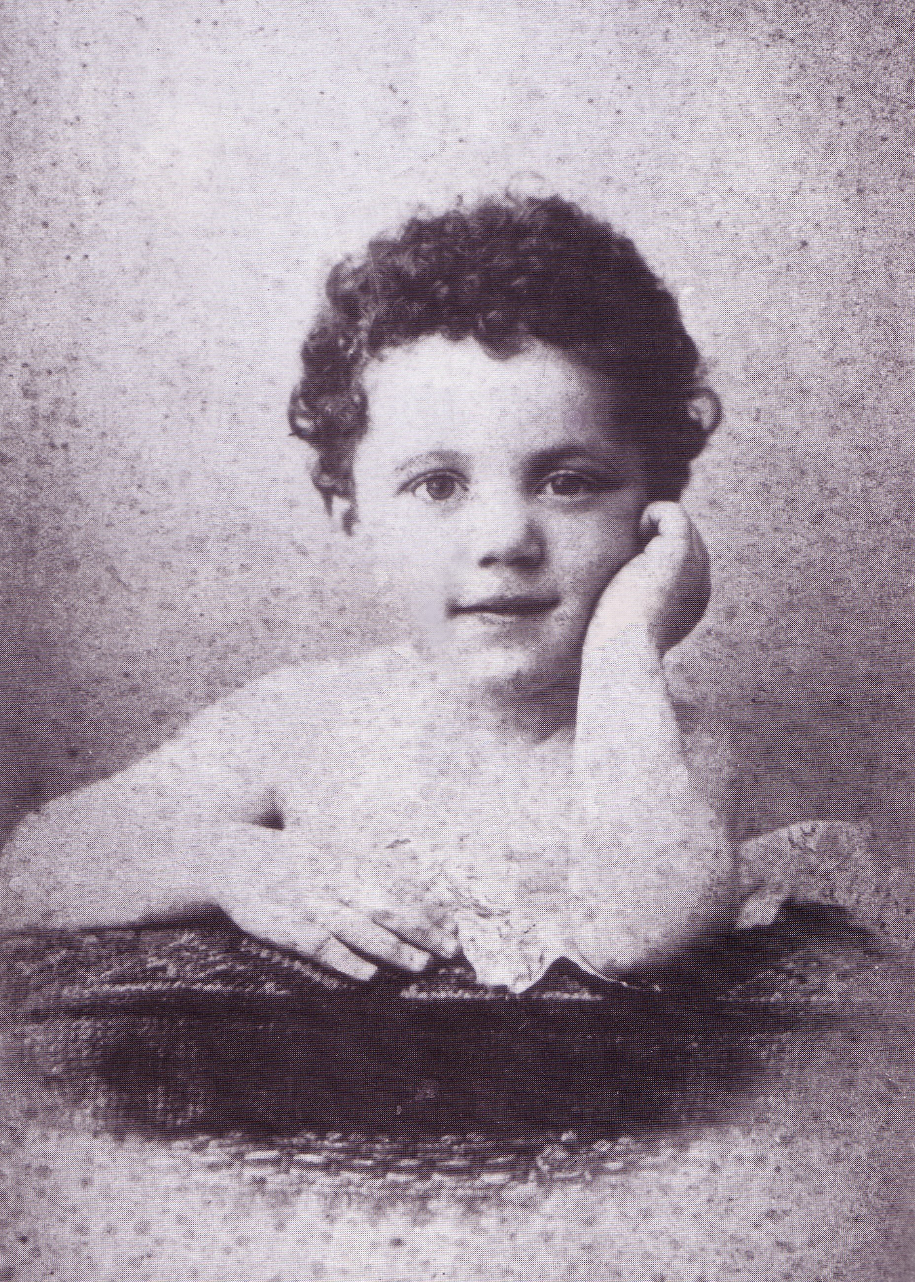 Gustave Pimienta deux ans et demi